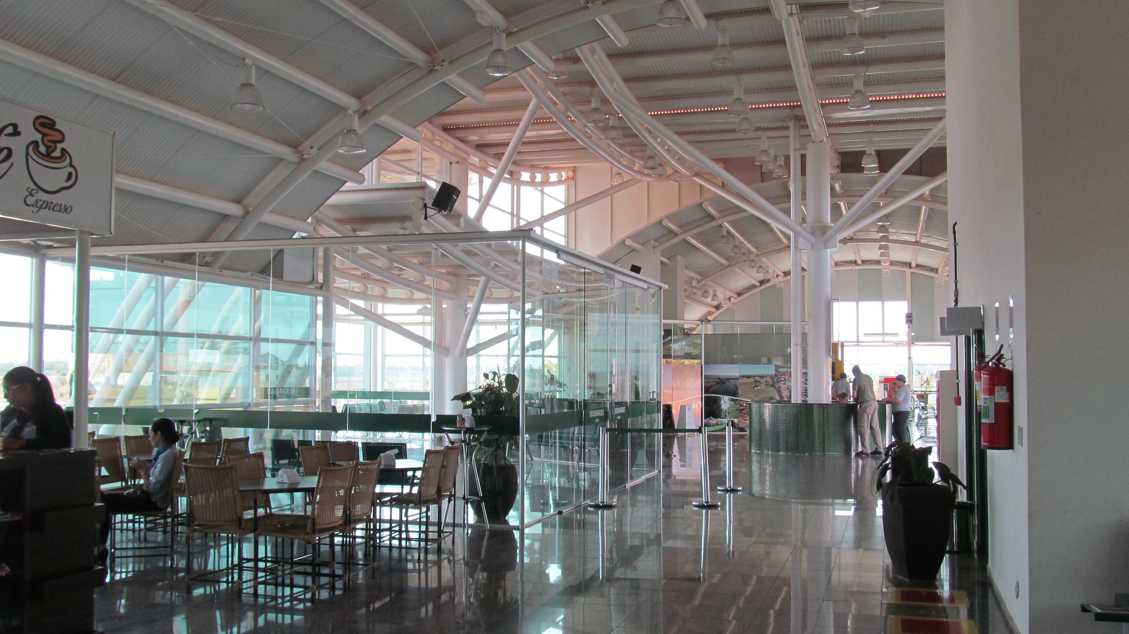 Três Lagoas Airport (TJL), interior view with arrival lounge